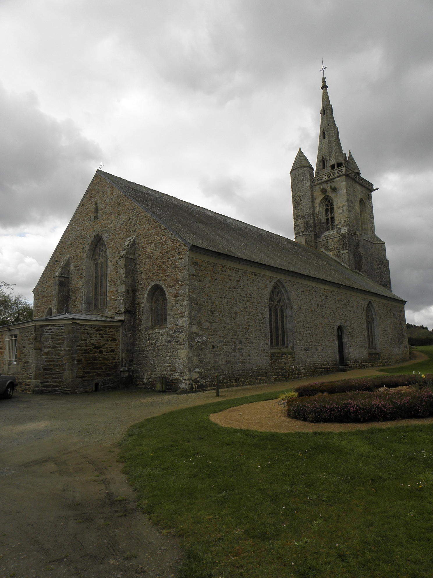 Chevet et flanc nord de la chapelle Notre-Dame-de-l'Isle en Goudelin (22). .